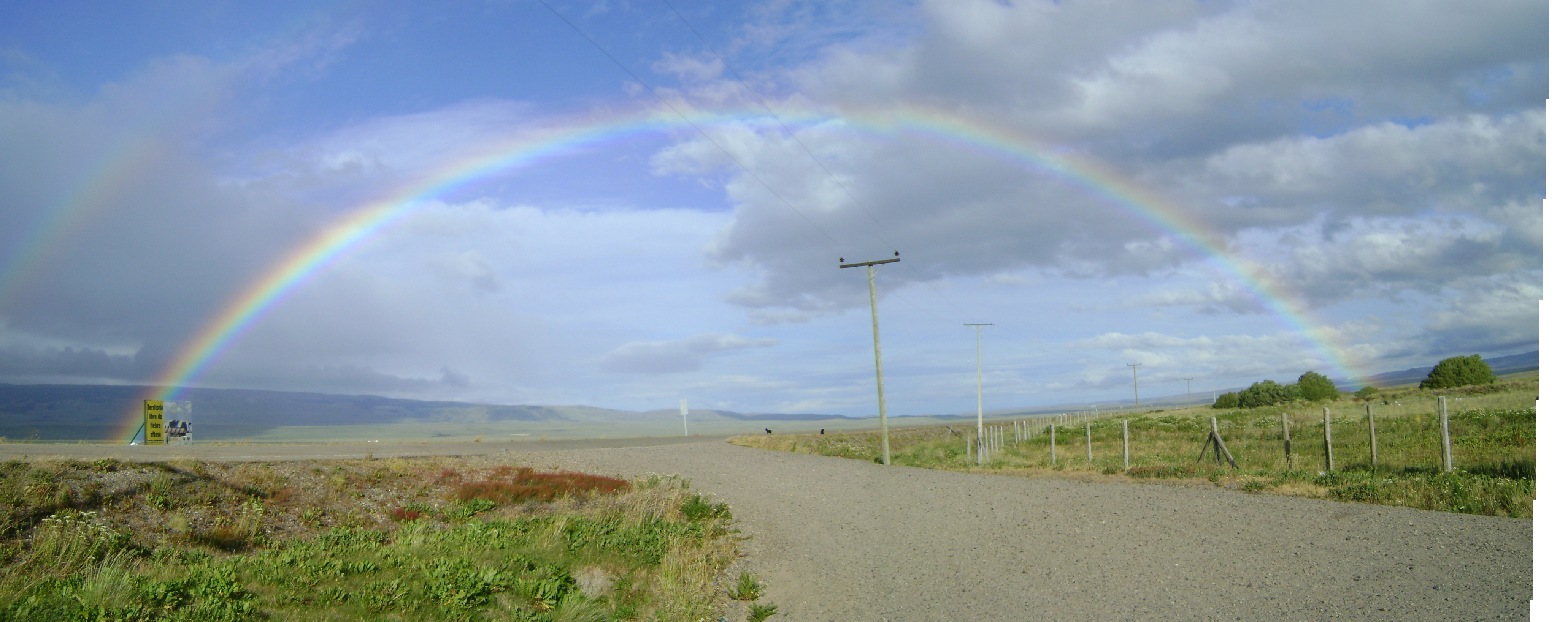 Paso Huemules/Balmaceda - Chile